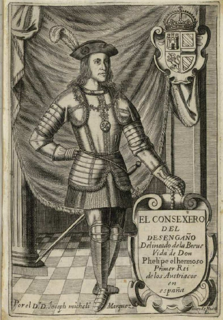 Felipe el Hermoso, dibujo de Juan de Noort para "El consejero del desengaño: delineado de la breve vida de don Phelipe el Hermoso, primer Rei de los austríacos en España por el doctor d. Joseph Micheli Márquez", manuscrito conservado en la Biblioteca Nacional de España, Mss/1253.